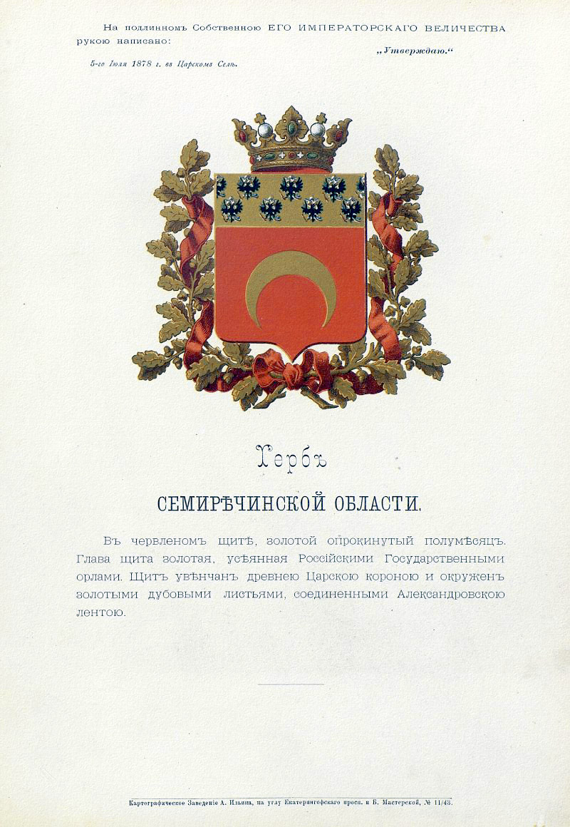 Official Russian Empire coat of arms Semirechensk Oblast. Полугласный герб Российской Империи Семиреченской области с официальным описанием в Гербовнике Бенке. Утверждён Императором Всероссийским Александром Вторым в 1878 году.